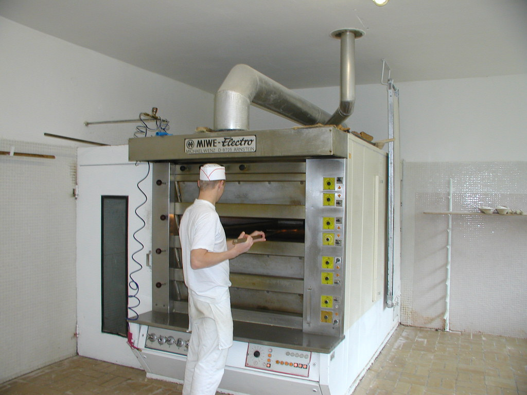 Bäckerei JA Gerasdorf